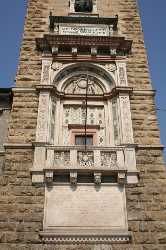 La Torre dei Caduti a Bergamo. Particolare.